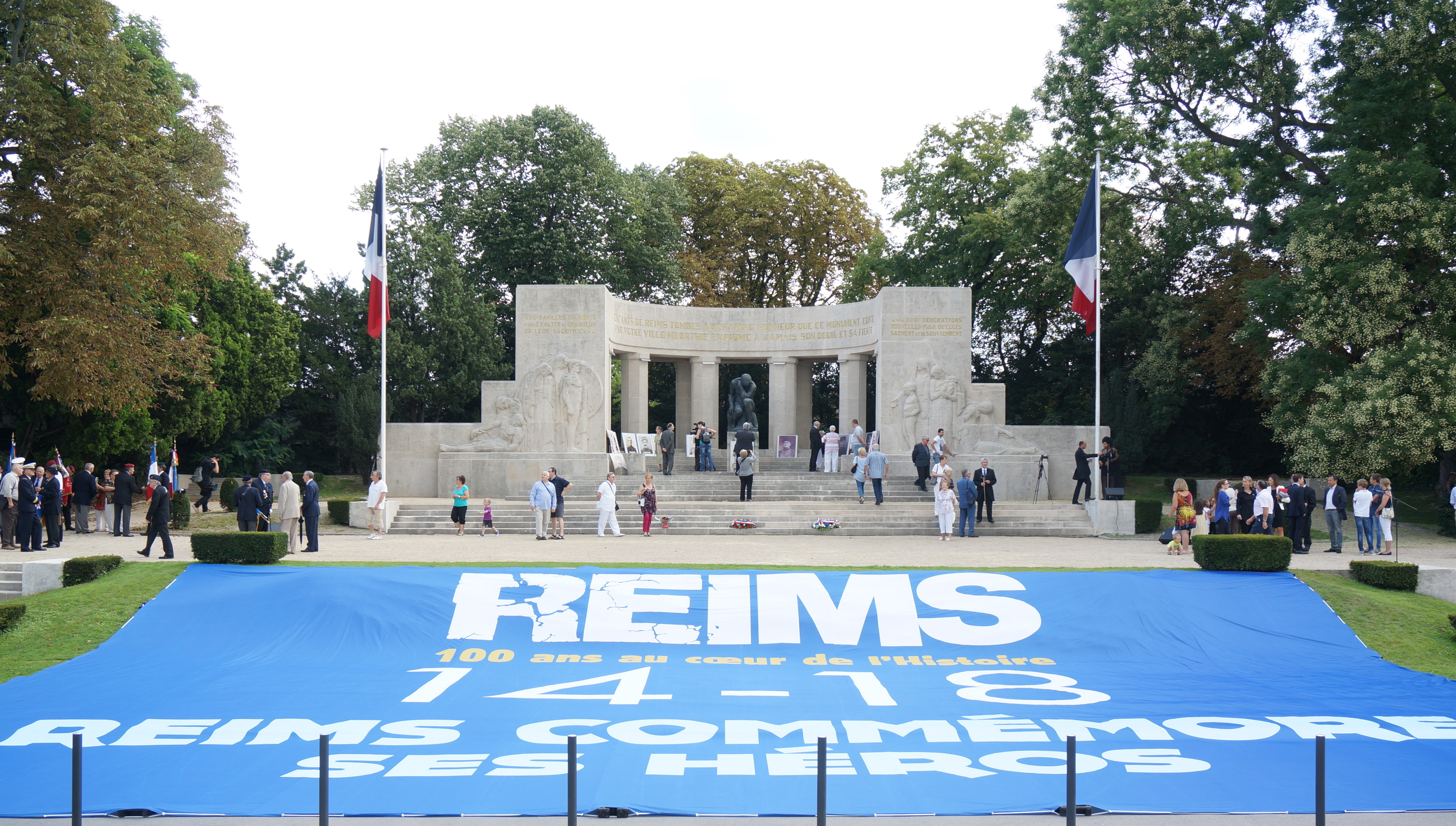 Reims commémore ses héros devant le Monument aux morts (Reims), centenaire de la déclaration de guerre.